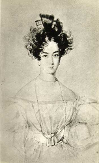 Giulia Rinieri de' Rocchi (1801-1881), amante di Stendhal, disegno, collezione privata